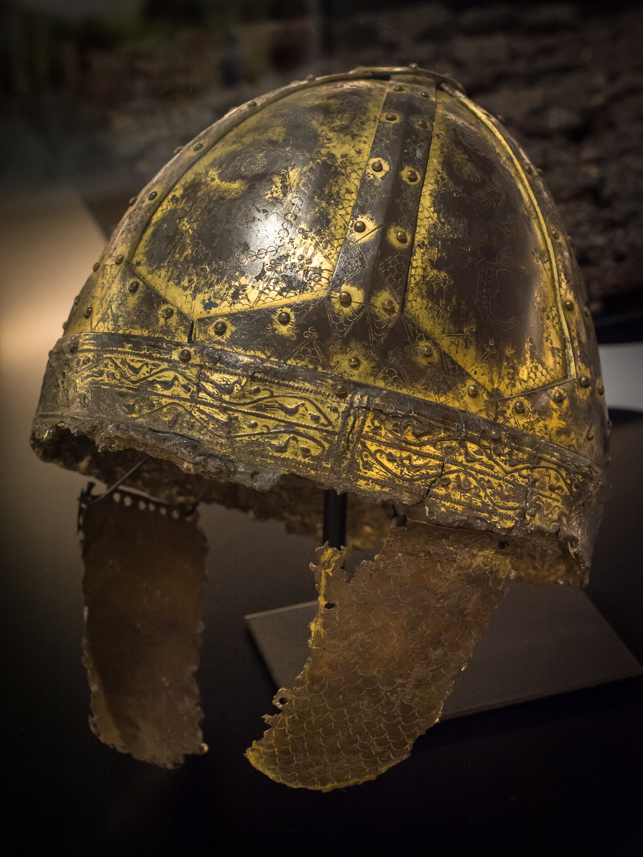 Spangenhelm aus dem Grab des Gammertinger Helmträgers. Original, aufgenommen im Landesmuseum Württemberg in Stuttgart.